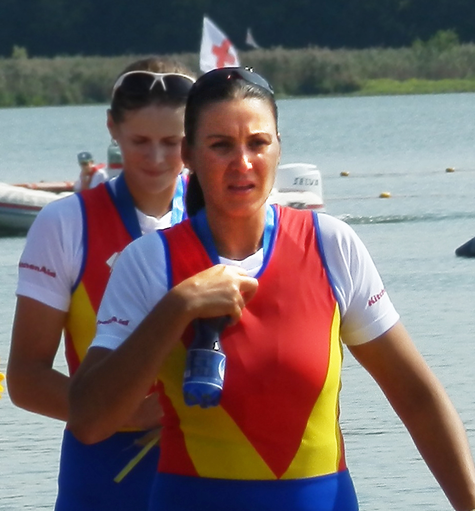 Georgeta Damian-Andrunache con la medaglia al collo dopo la premiazione agli Europei 2012